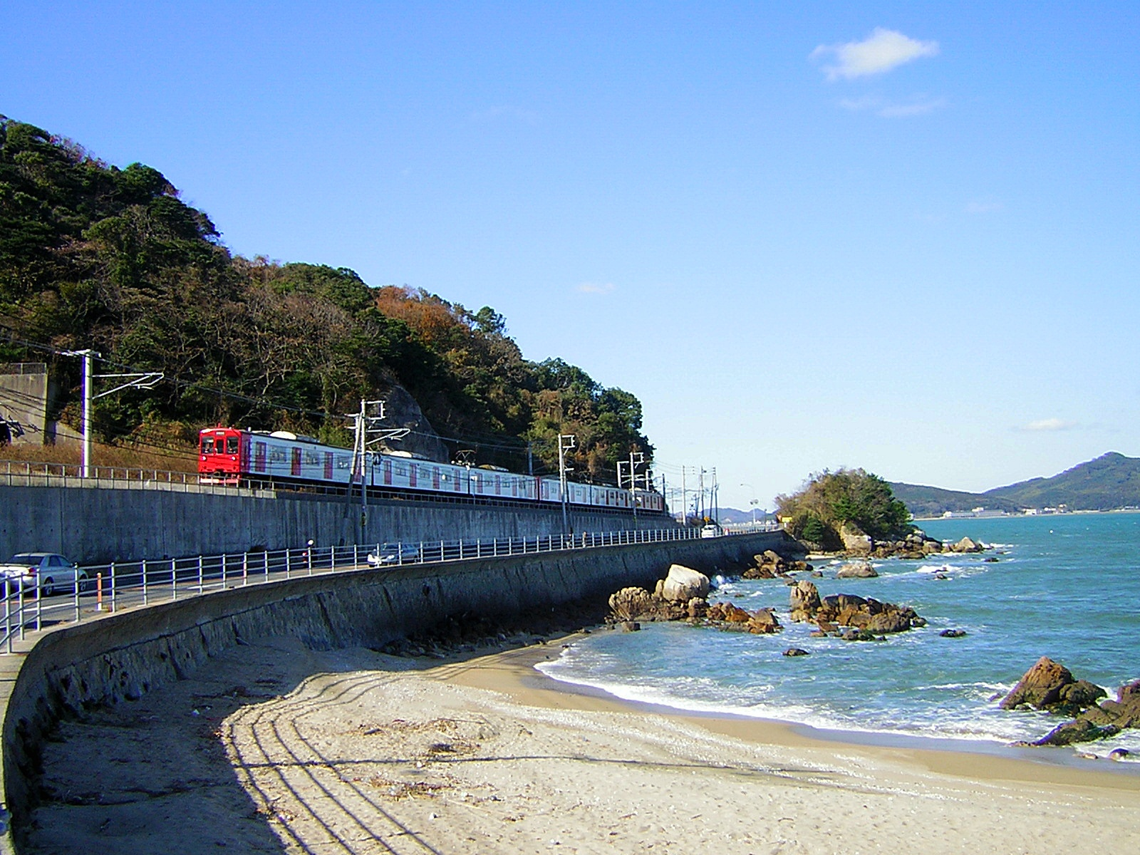 博多湾に沿って走る筑肥線103系1500番台